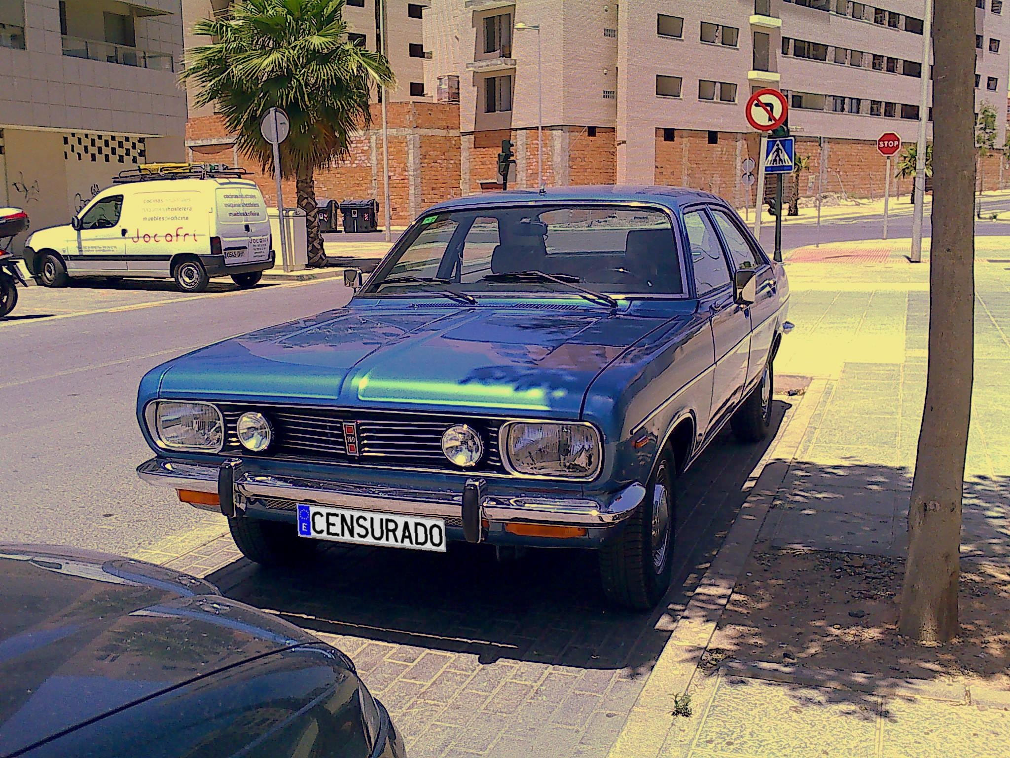 Chrysler 180, hecho en España por Barreiros